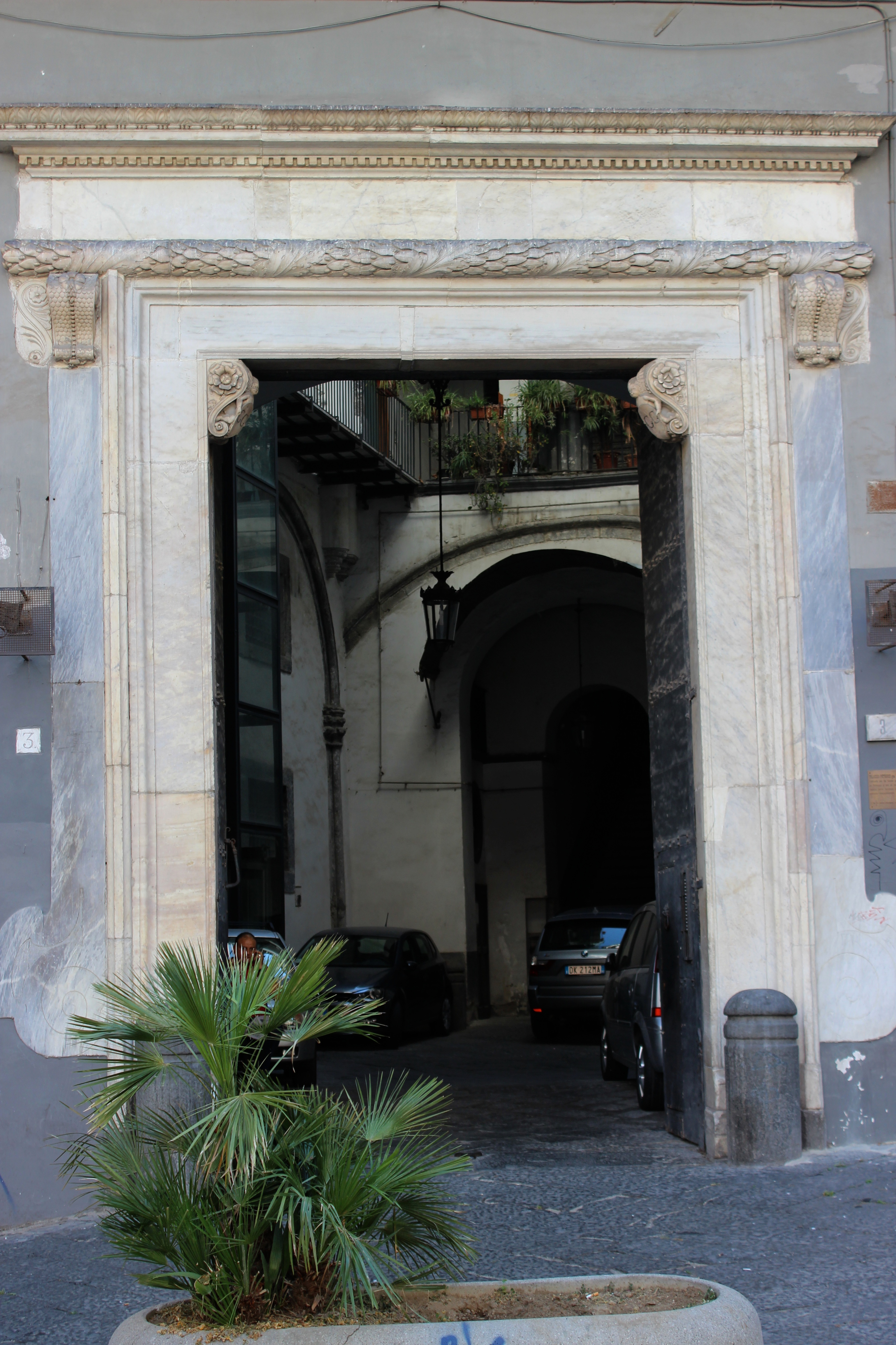 Nápoles. Palazzo Petrucci, portada.